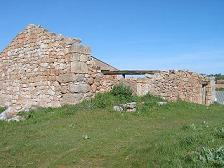 Lagar de Dios en Quintanilla de la Mata